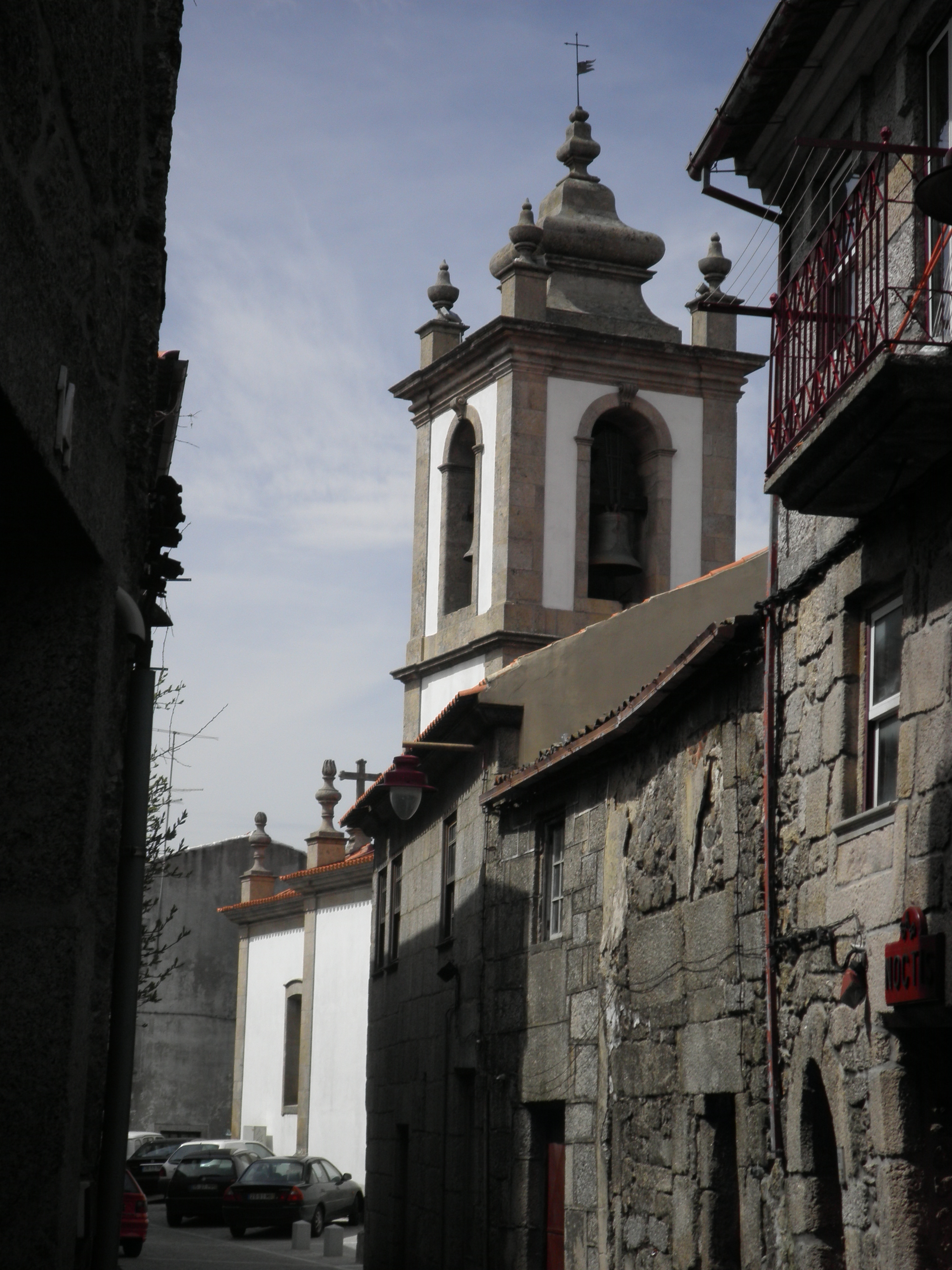 Guarda